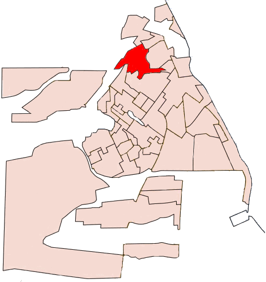 Barrio Mirador